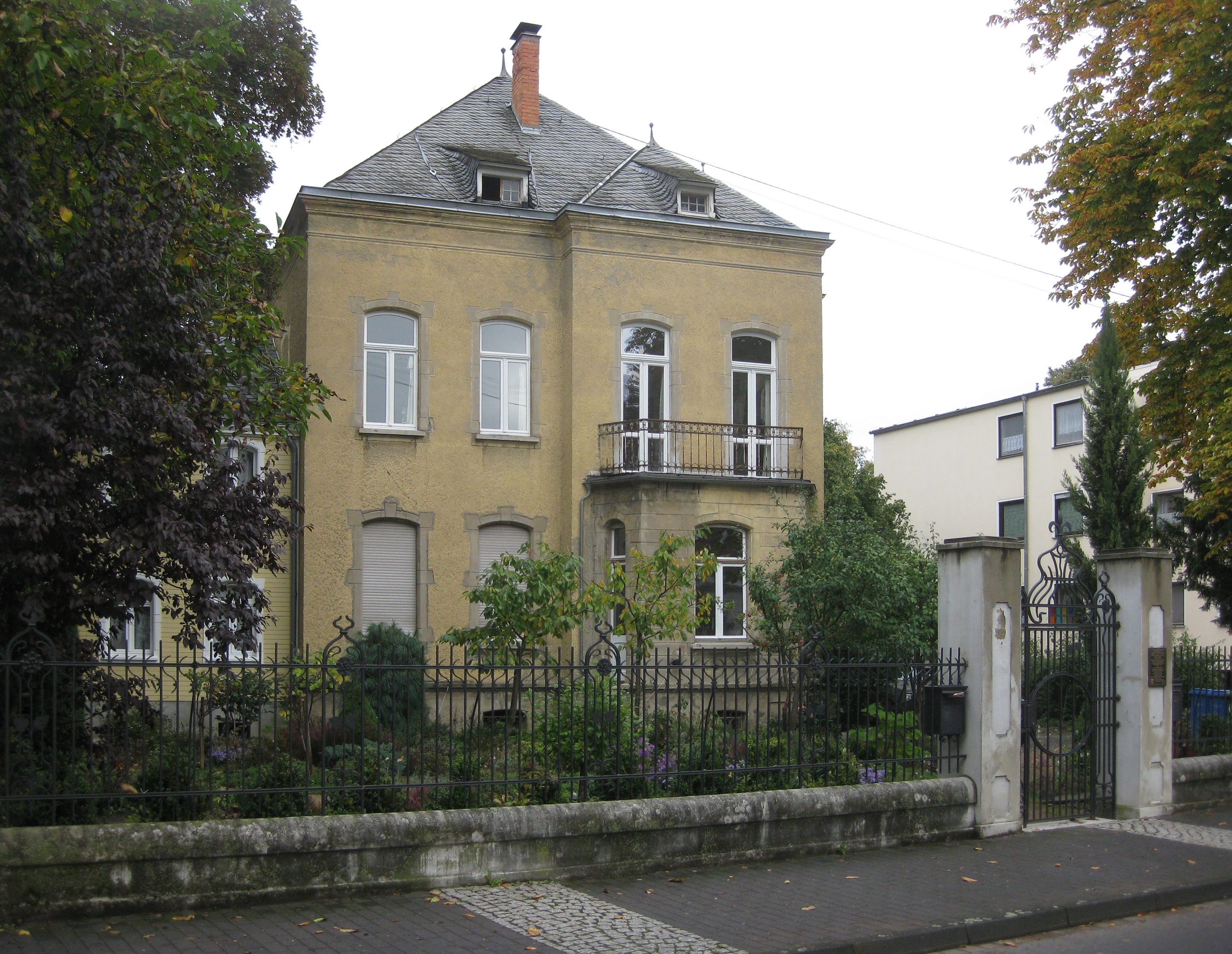 Ehemaliges Wohnhaus von Adolf Süsterhenn in der Bahnhofstr. 7 in Unkel/Rhein mit einer Gedenktafel zur Erinnerung an die Entstehung der Landesverfassung von Rheinland-Pfalz und zwei seiner Verfasser (Ernst Biesten, Adolf Süsterhenn). Siehe [1]